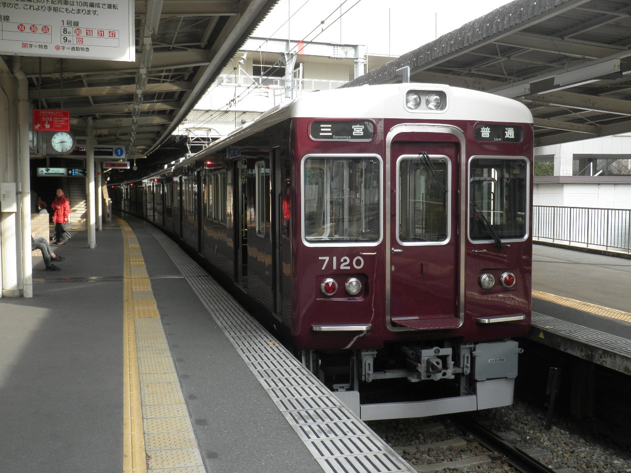 2014-1 西宮北口駅にて投稿者本人が撮影